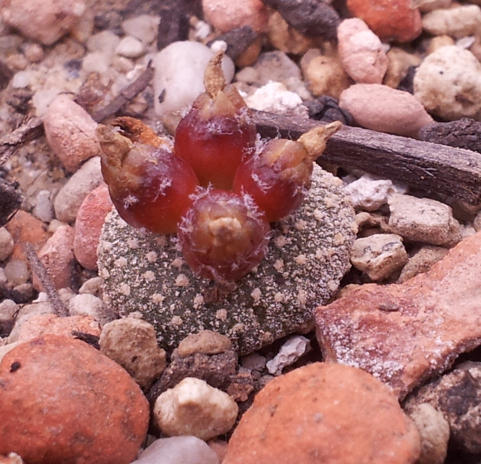 Blossfeldia liliputana mit Früchten in Kultur